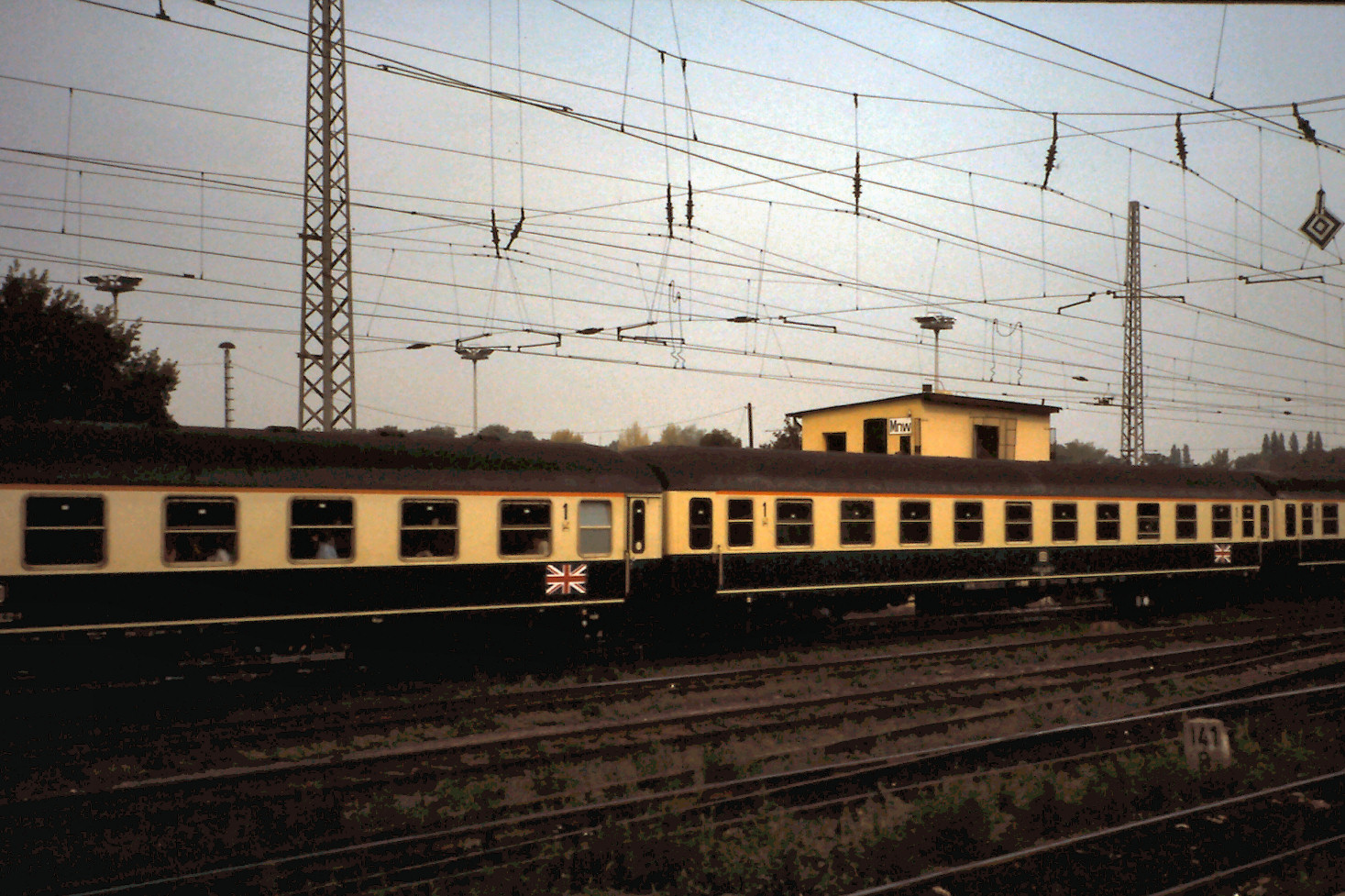 Militärzug "The Berliner" des Royal Corps of Transport, verkehrte zwischen Berlin-Charlottenburg und Hannover (im öffentlichen Fahrplan nicht verzeichnet)